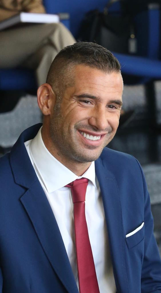 Puggioni durante la tesi di laurea